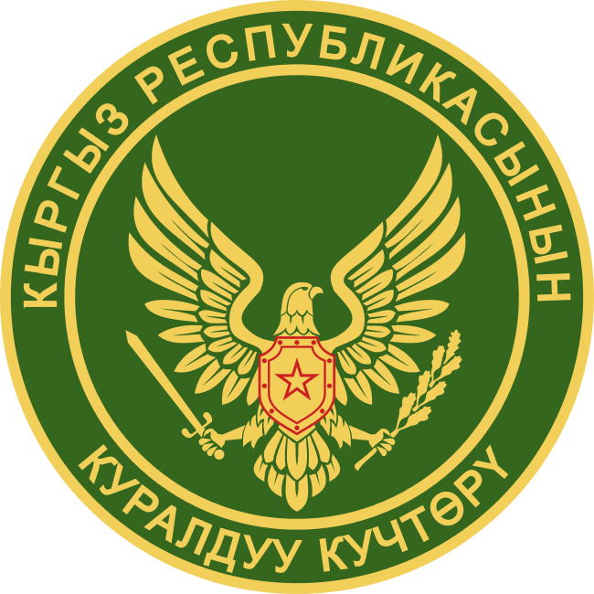 Герб Вооруженных Сил Кыргызской Республики